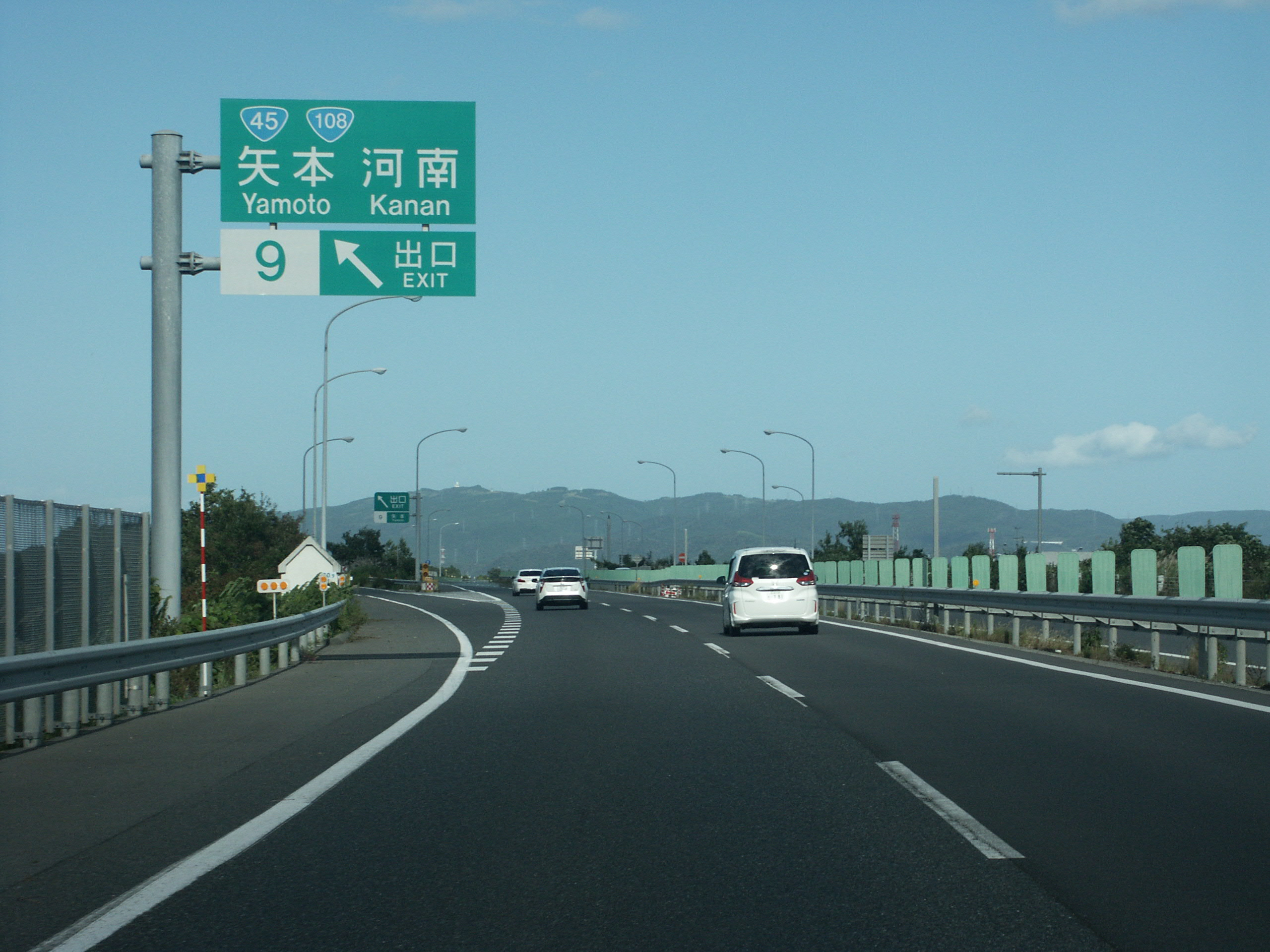 三陸自動車道矢本IC 出口付近（利府JCT方面側）